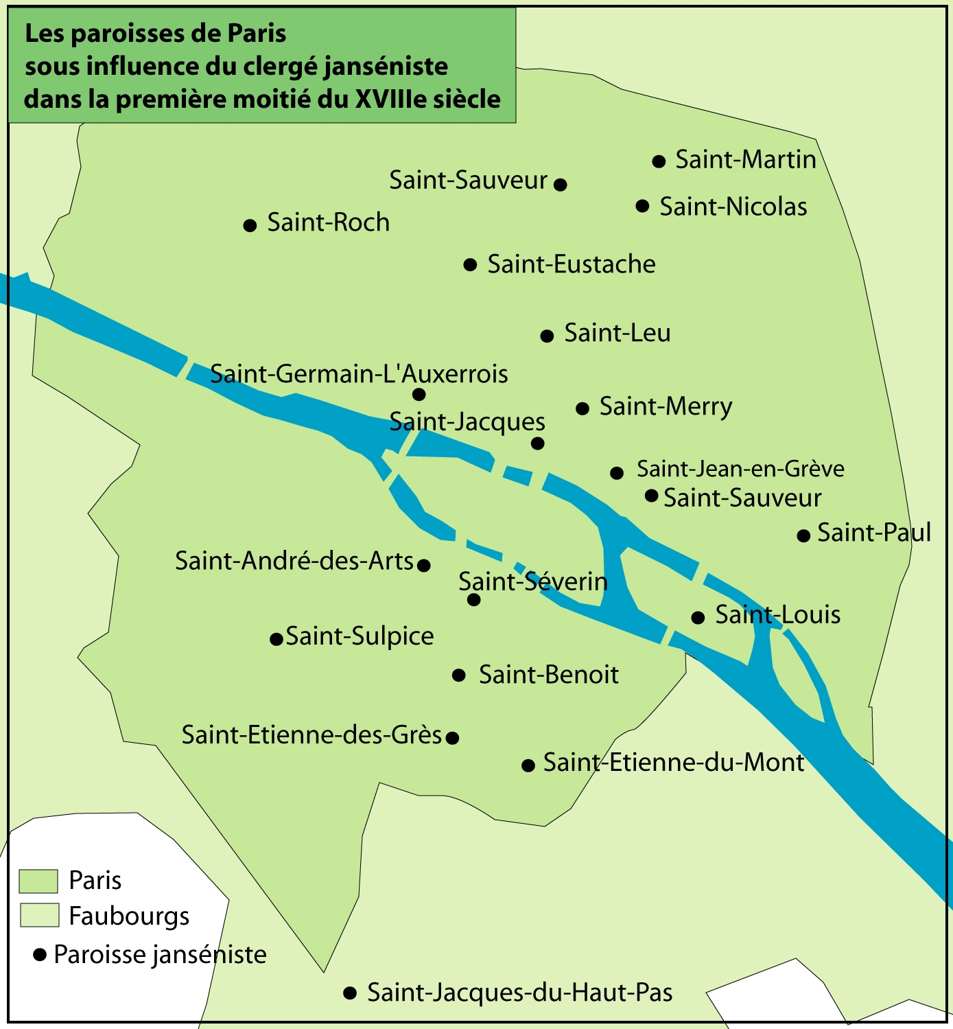 Paroisses jansénistes de Paris vers 1730